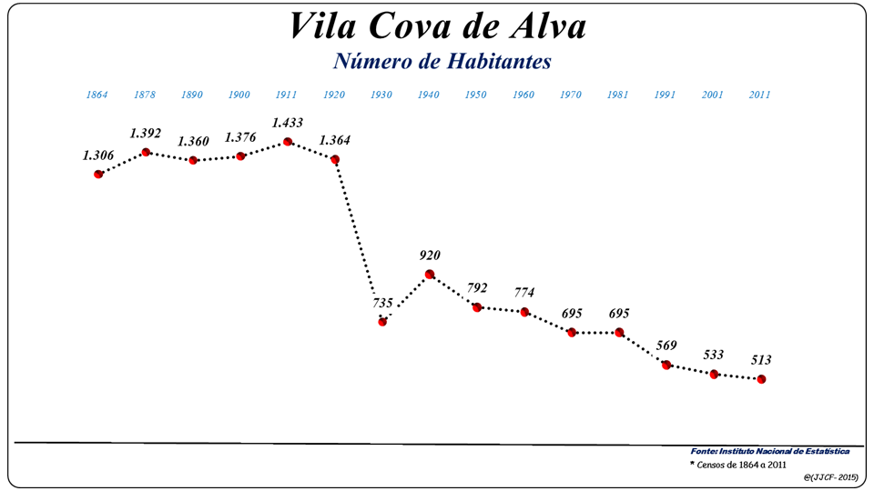 População